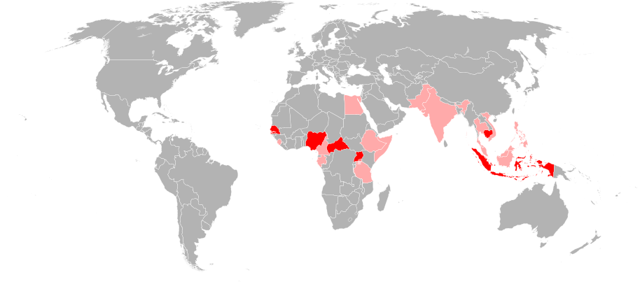 Carte de répartition du virus Zika dans le monde. En rouge : Régions où le virus a été isolé chez les hommes. En saumon : Région où des anticorps anti-virus Zika ont été mis en évidence chez l'Homme. D'après : Andrew D. Haddow, Amy J. Schuh, Chadwick Y. Yasuda, Matthew R. Kasper, Vireak Heang, Rekol Huy, Hilda Guzman, Scott C. Tesh et Weaver, « Genetic characterization of Zika virus strains: geographic expansion of the Asian lineage », PLoS Negl. Trop. Dis., vol. 6, no 2, 2012, p. e1477.